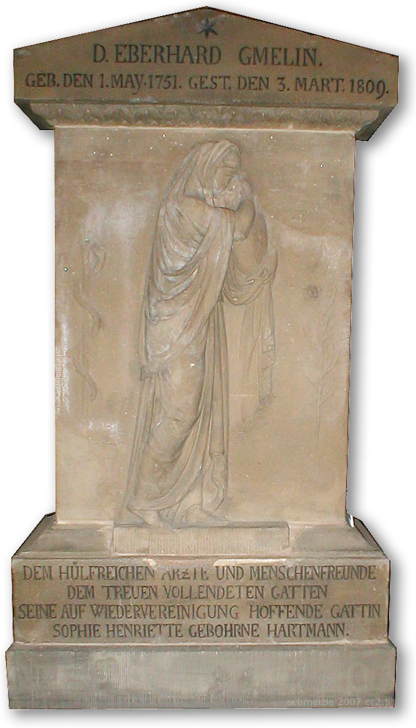 Grabstein von Eberhard Gmelin in Heilbronn, Baden-Württemberg, Deutschland